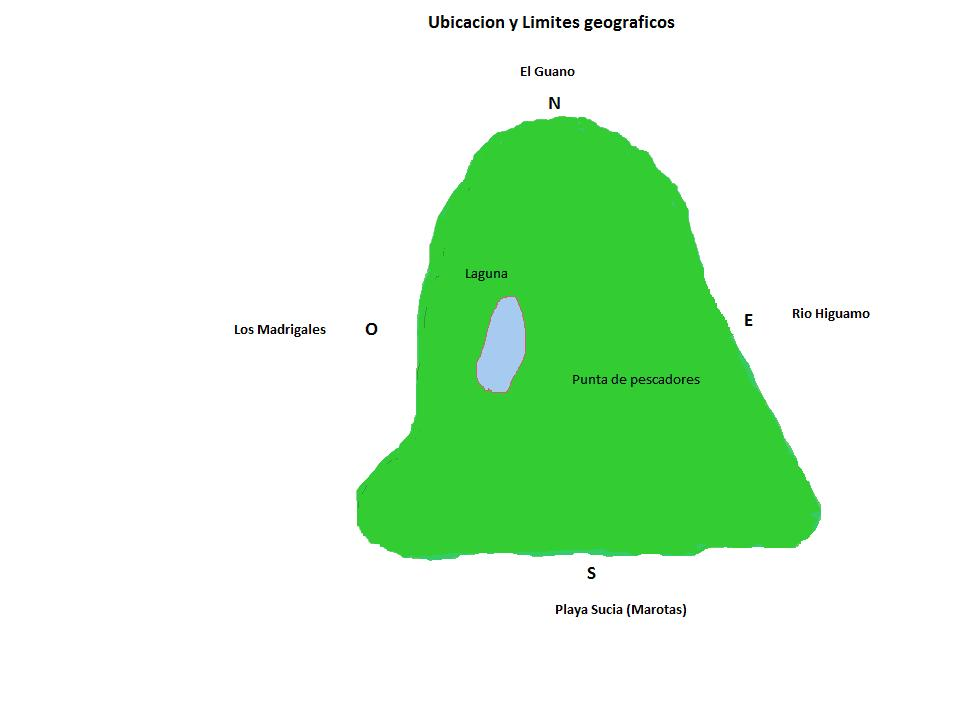 Punta Pescadora, San Perdro de Macoris has no laguna